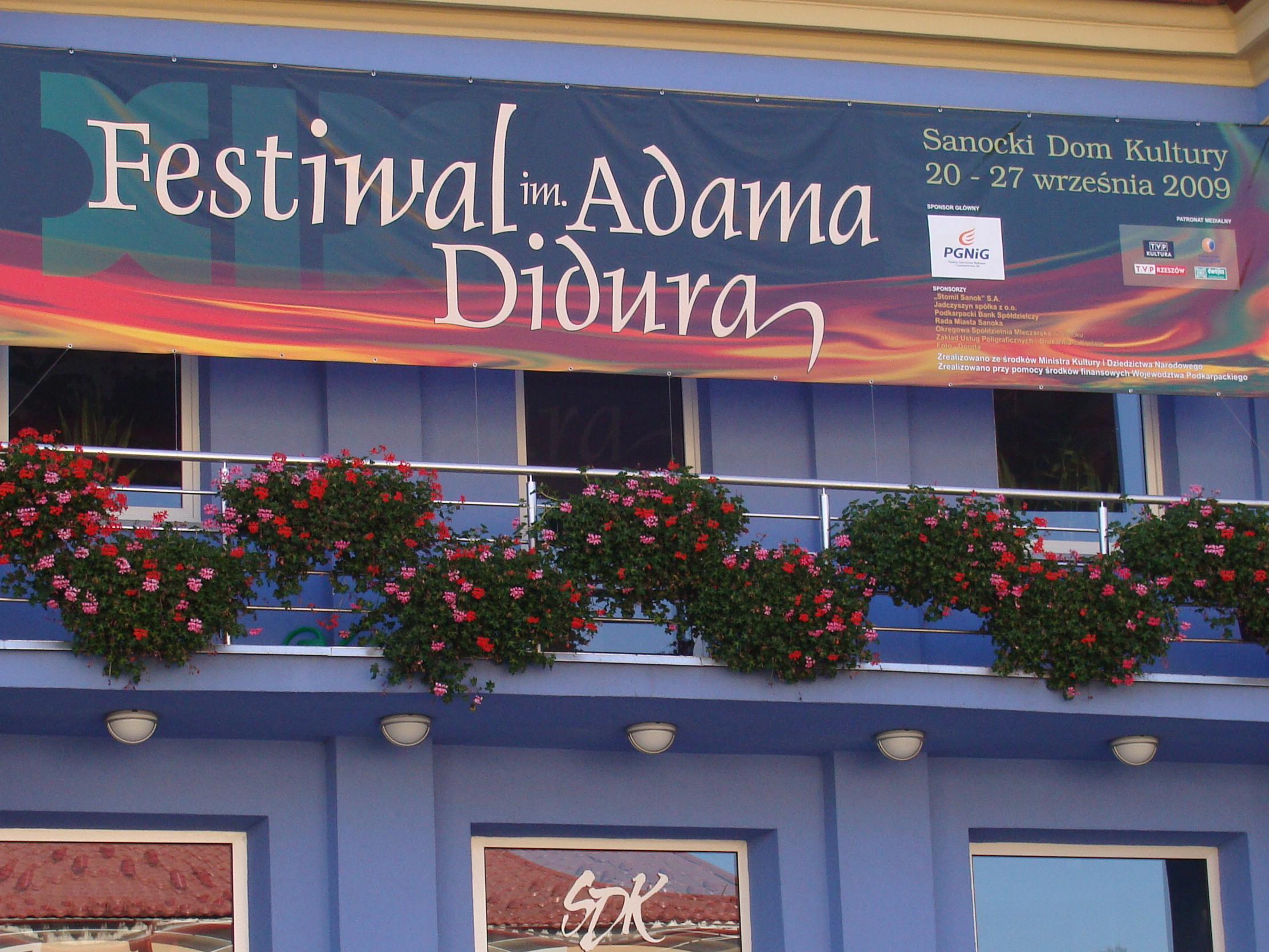 Festiwal im. Adama Didura, Sanok, SDK (baner), 21-09-2009